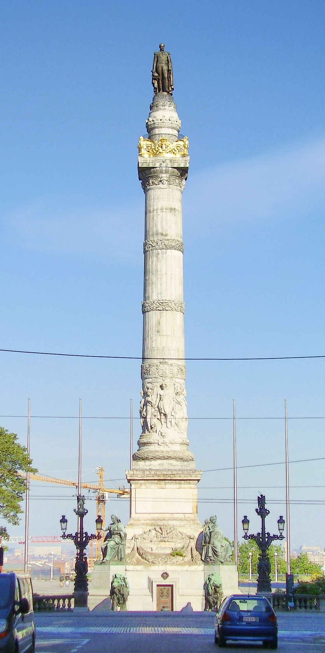 Description: Colonne du Congrès, Bruxelles (1859), architecte Joseph Poelaert Author: User:Ben2 Date of creation: 17 juin 2006 Source: Photo personnelle